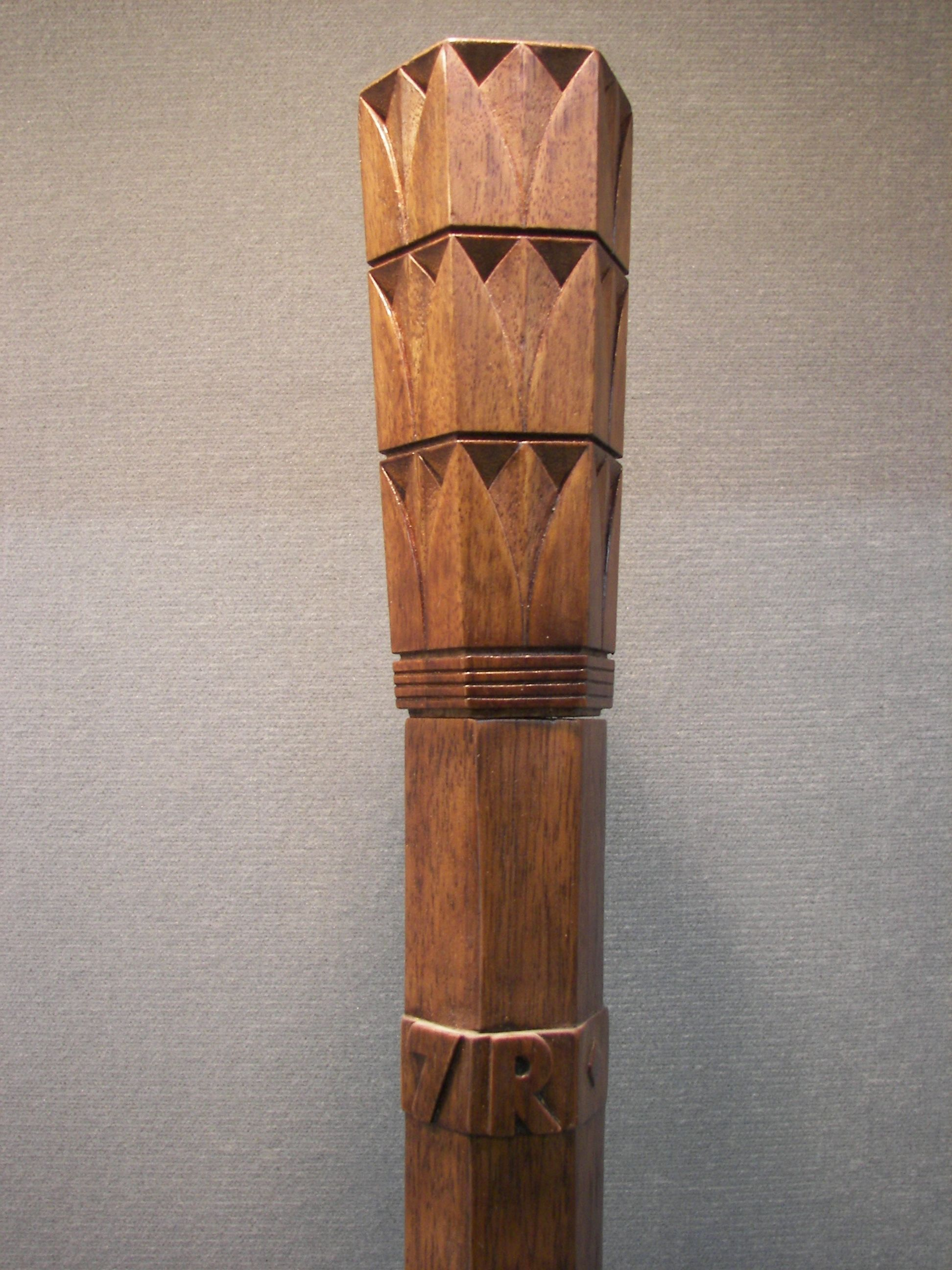 Sejm RP, detale: laska marszałka, ekspozycja w hallu budynku głównego zdjęcie wykonane 24 stycznia 2007 roku, autor: Piotr VaGla Waglowski